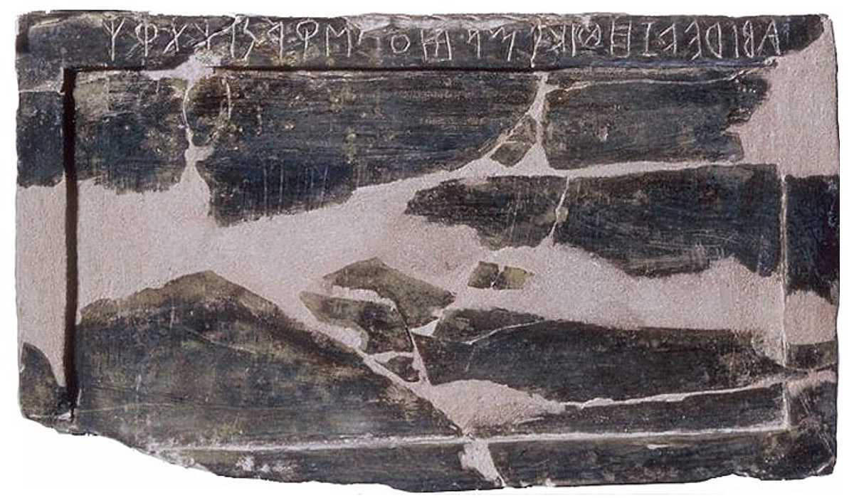 Tablette de Marsiliana d'Albegna - Grosseto - Italie. Avec abécédaire de l'alphabet étrusque. VIIe siècle av. J.-C. Musée archéologique national de Florence.